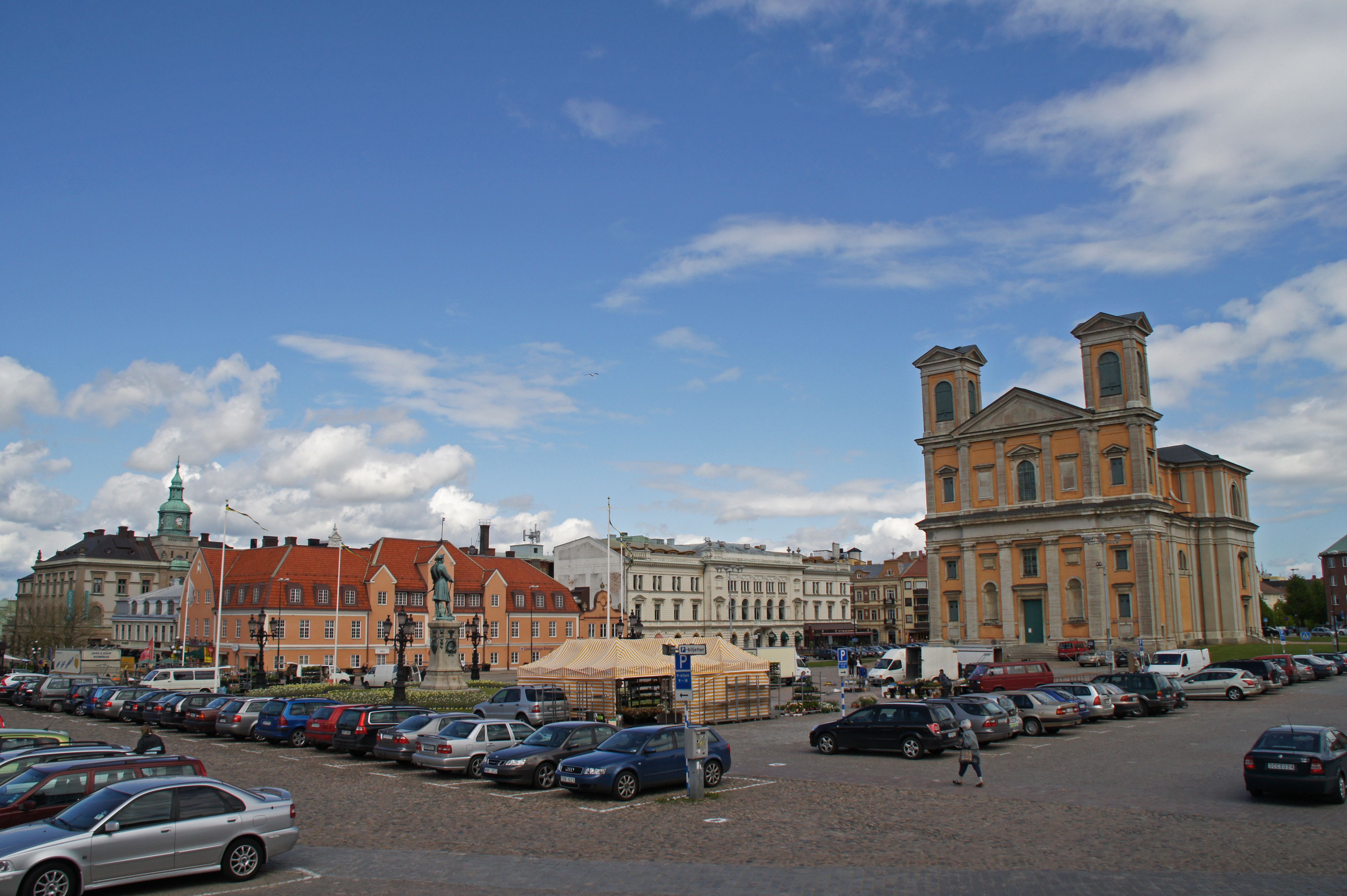 2010-05-22 06-05 Schweden 0623 Karlskrona, Stortoget, Frederikskyrkan